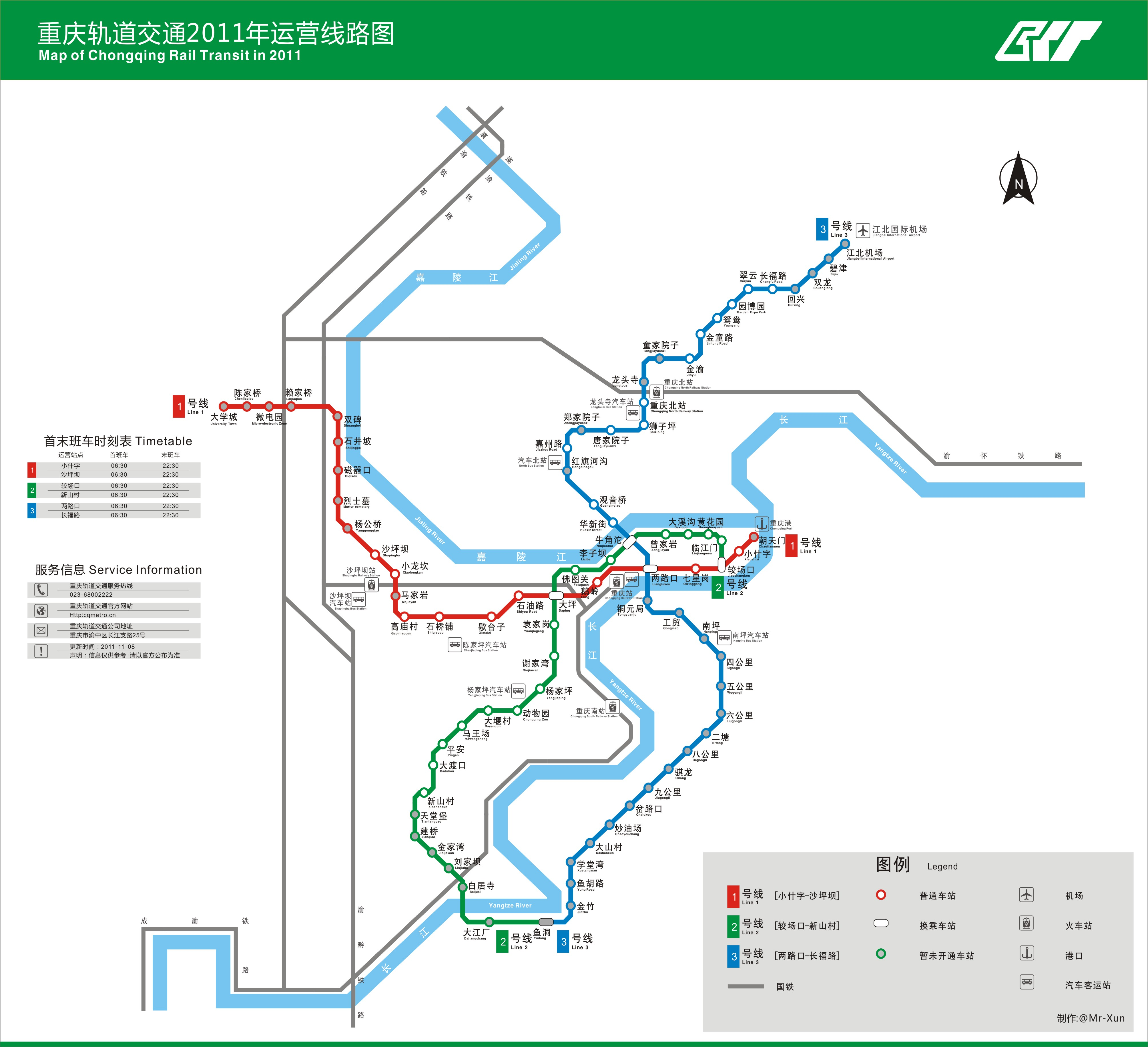 2011重慶軌道交通運營圖